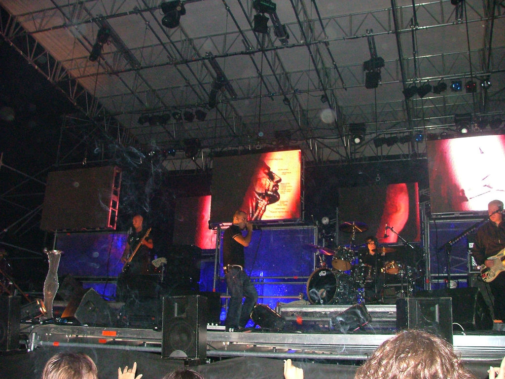 Subsonica live a Castagnole delle Lanze (AT) -Italia- 31 agosto 2005